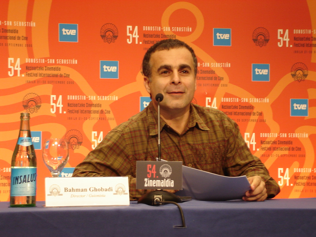 Bahman Ghobadi, Iranian/Kurdish film director in San Sebastian (Spain)